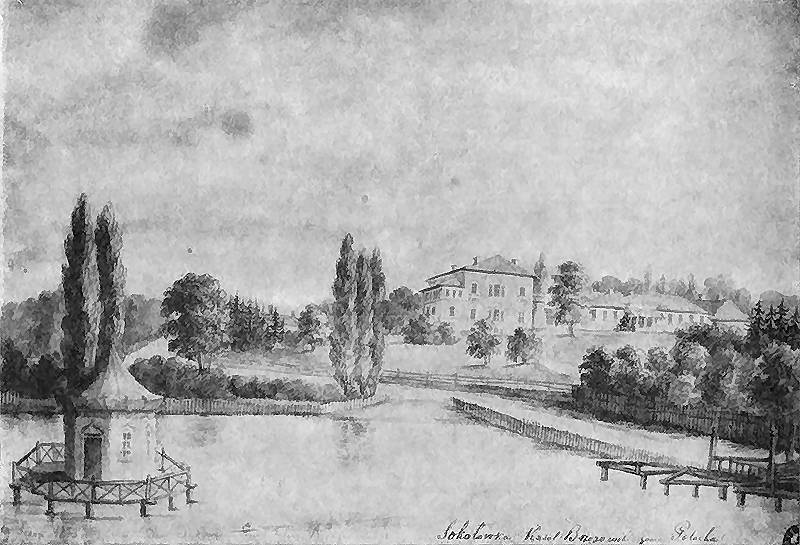 село Соколівка